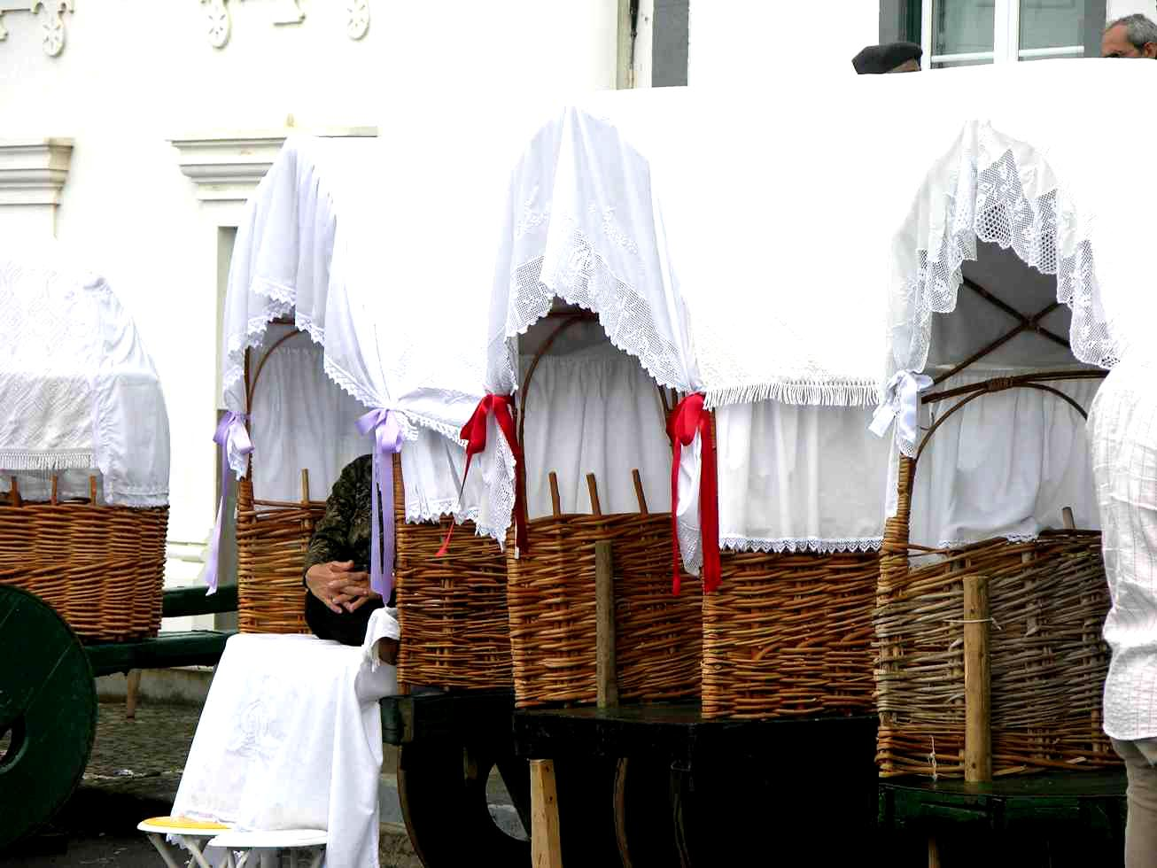 Carros alegóricos na Vila Nova, ilha Terceira, Açores, Portugal.